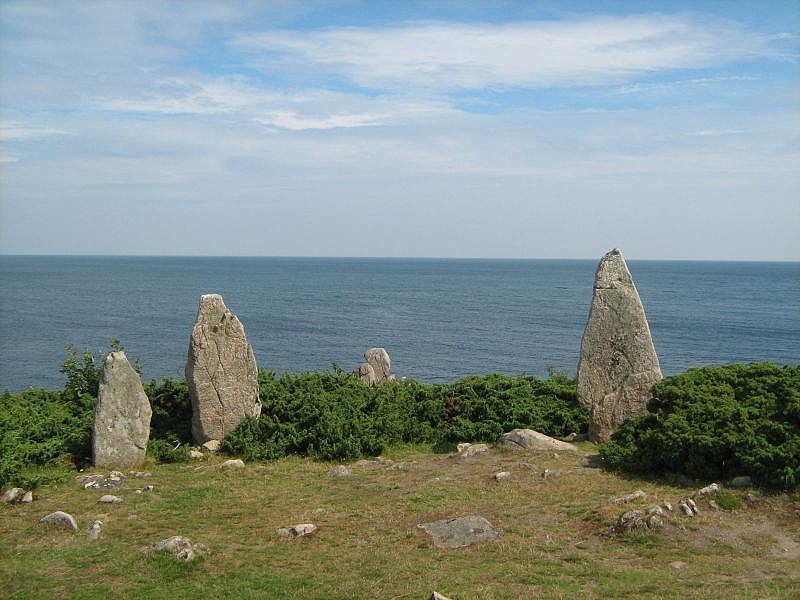 Stammershalle, zwischen Allinge und Gudhjem an der Nordostküste von Bornholm gelegen.